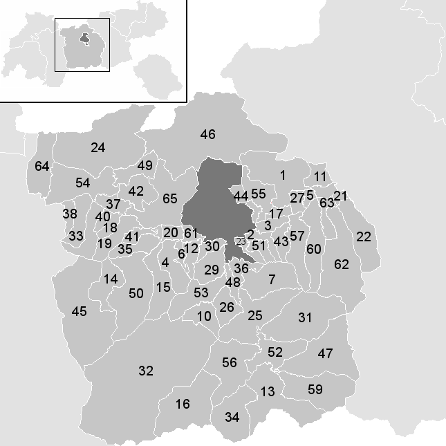 Leere Karte mit den Gemeinden im Österreichischen Bezirk Innsbruck Land